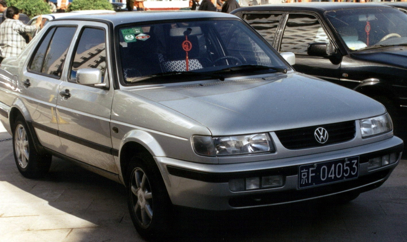 VW Jetta in Beijing, China.